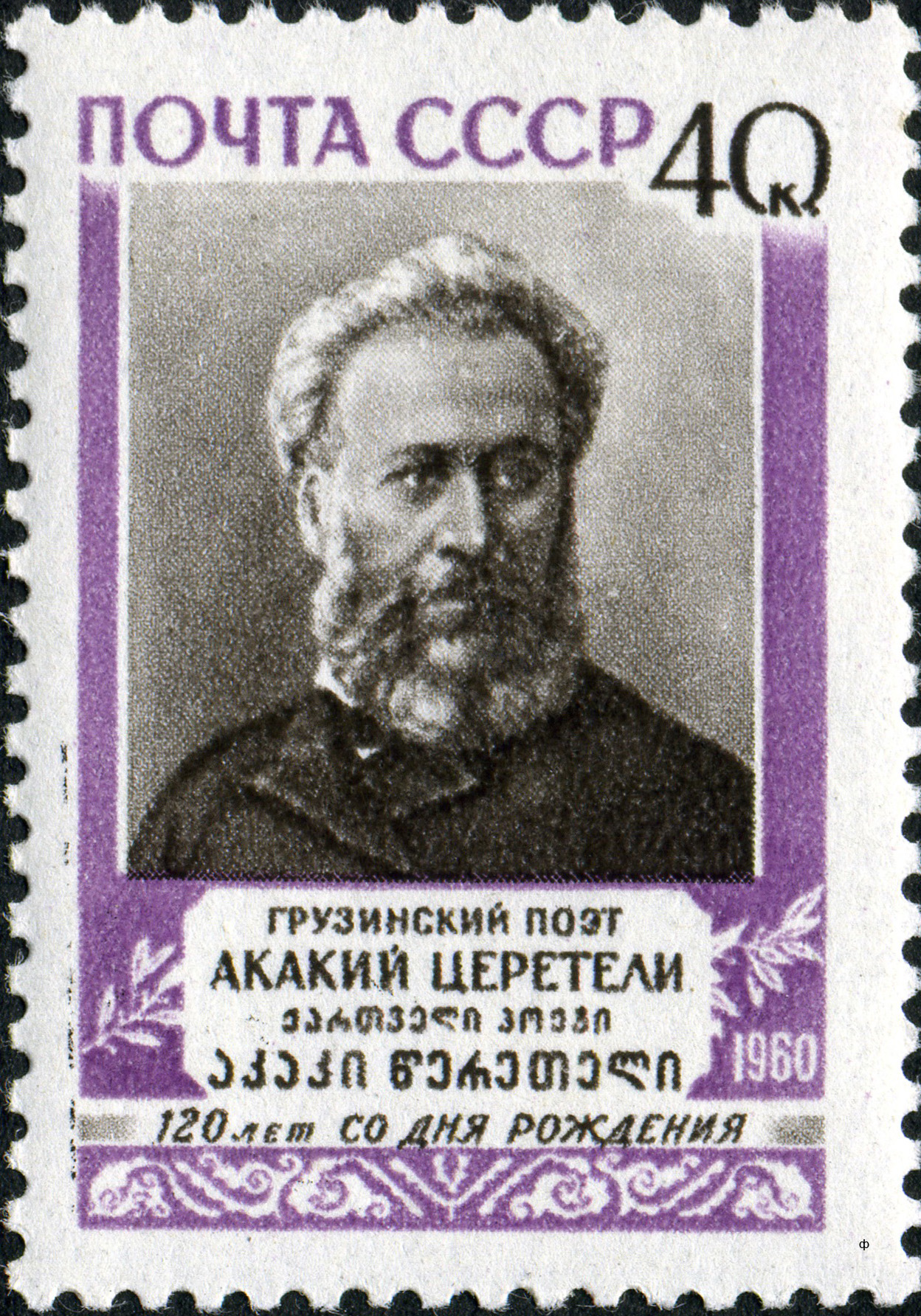 Марка СССР. ЦФА 2509. Портрет А. Р. Церетели